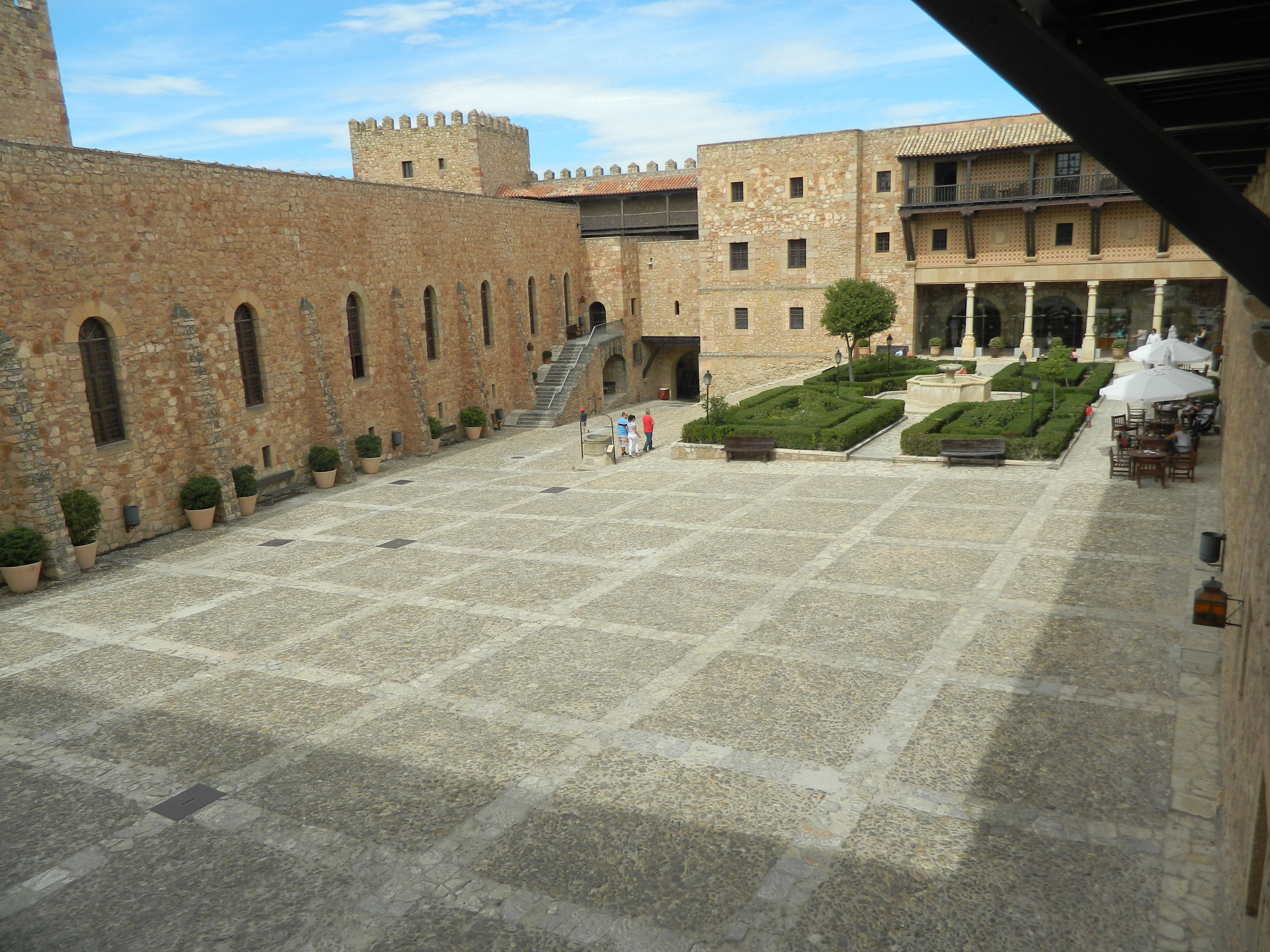 Vista panorámica del Patio de armas Castillo de Sigüenza, Parador de Turismo, desde una de las ventanas del castillo.